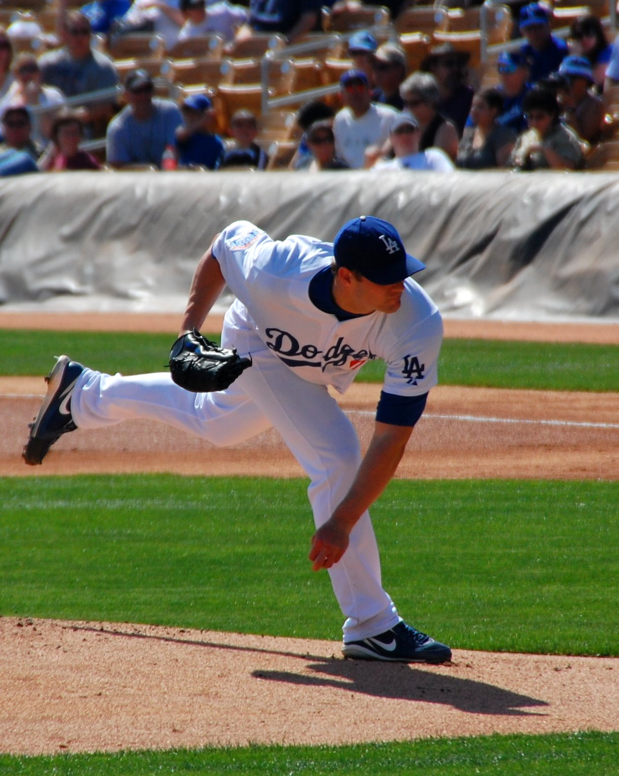 Eric Stults